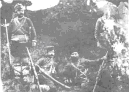 Никола Груйчин (седнал отдясно).